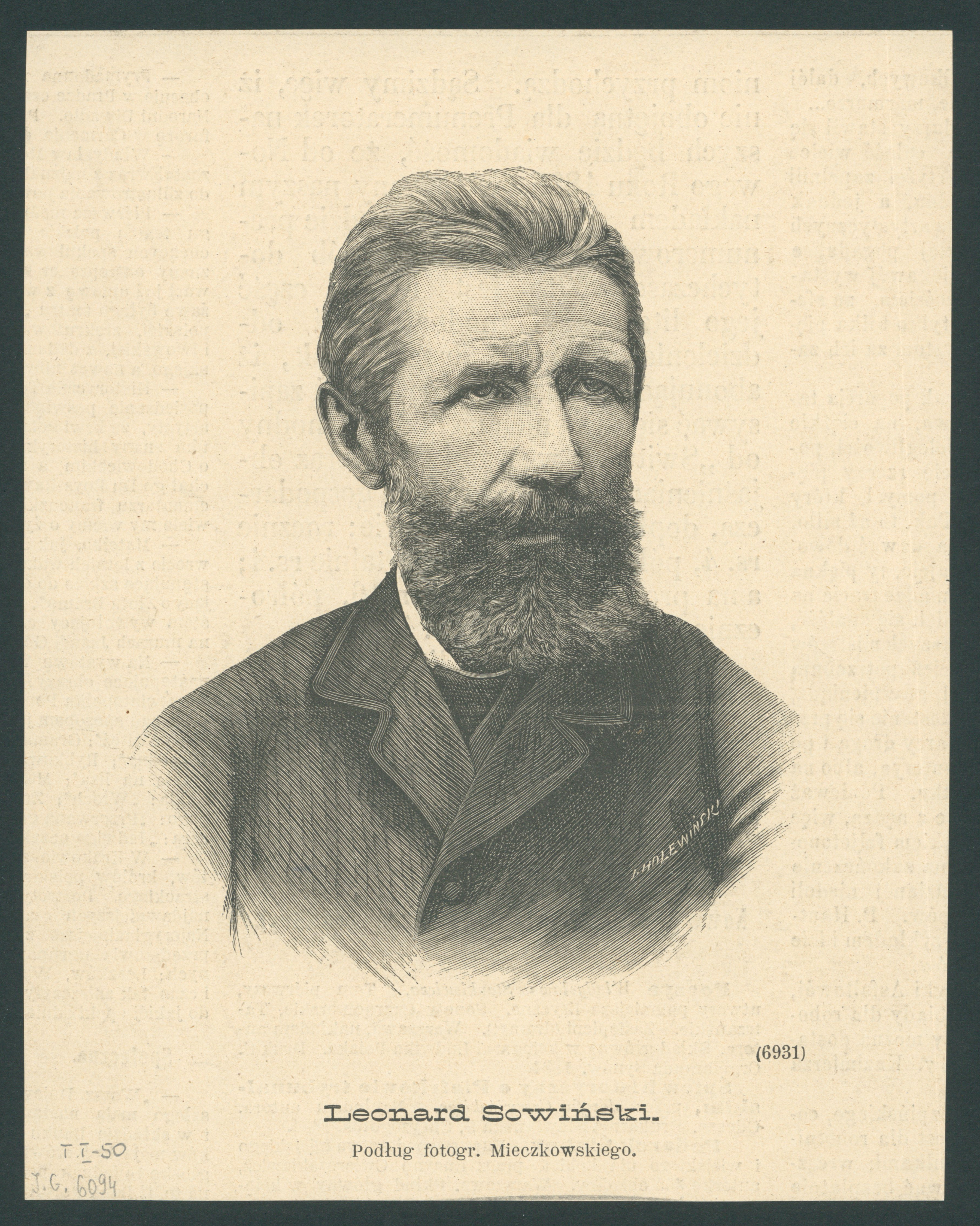 Leonard Sowiński